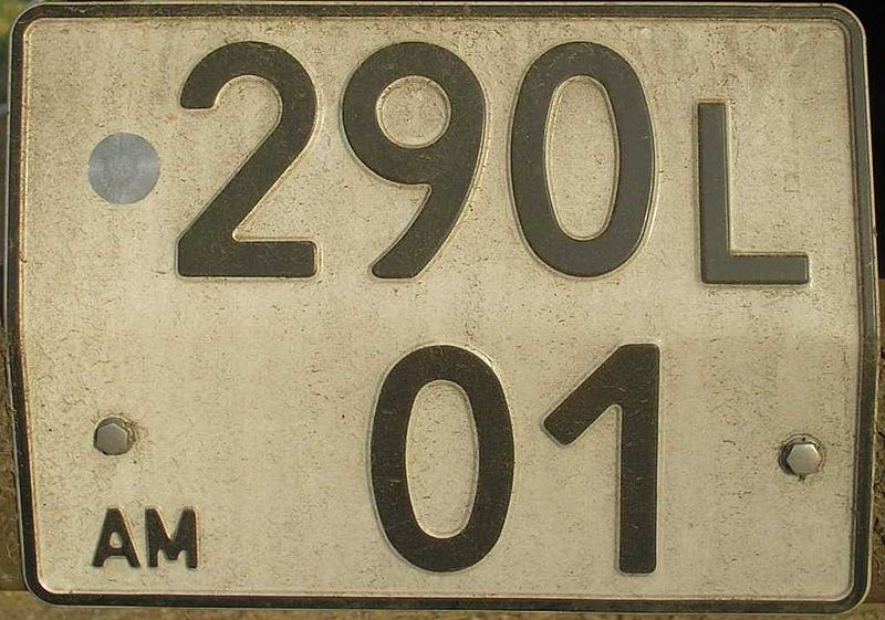 Номер прицепа Армении, зарегистрированного на юридическое лицо